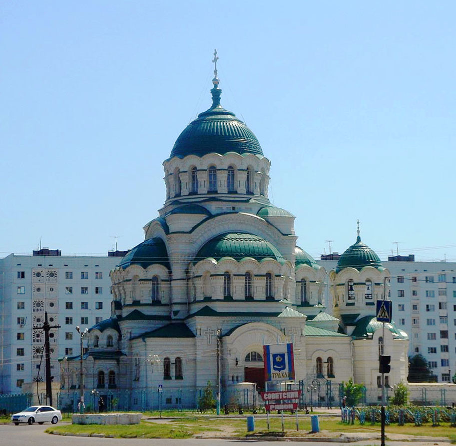 Temple of St Vladimir. It was turned to bus station in Soviet time, in 1999 it was returned to church. Собор св. Владимира, 1895—1904 (в советское время в здании располагался автовокзал, в 1999 г. храм передан православной церкви)